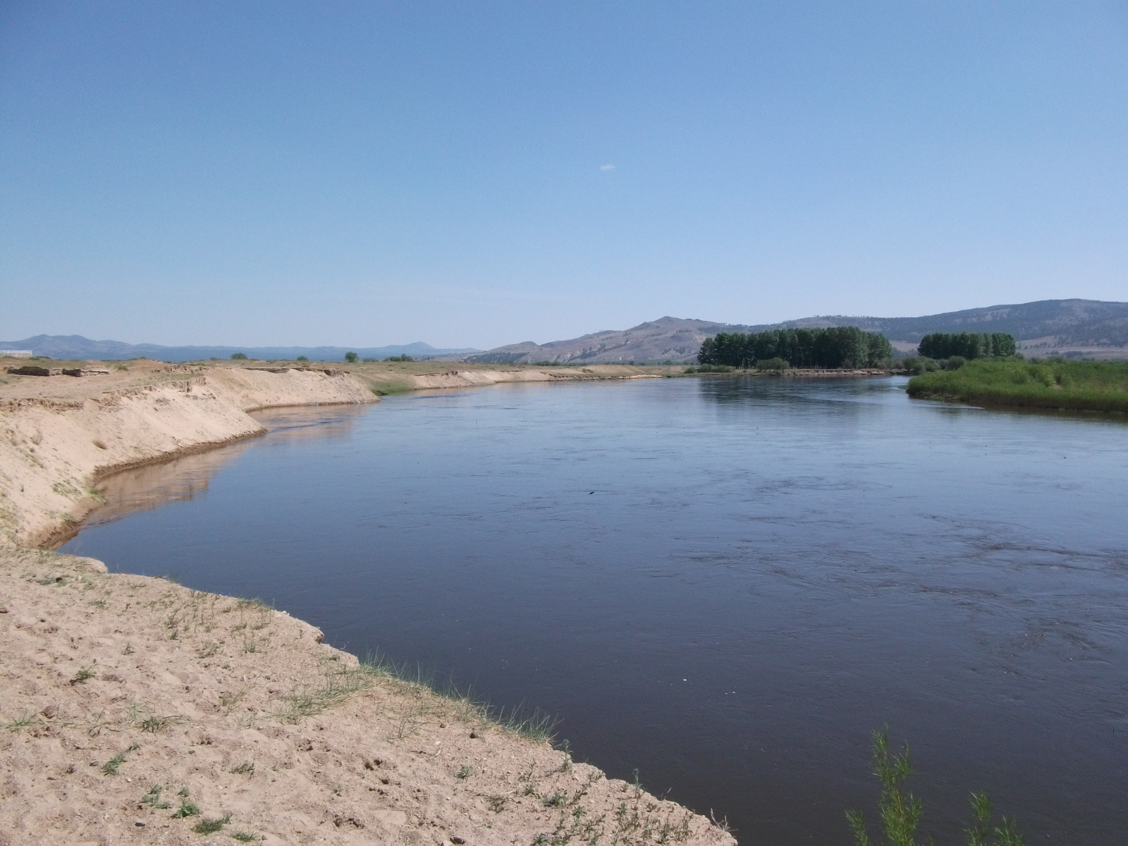 Чикой: Красночикойский район, This image is related to the protected area of Russia number 7500081